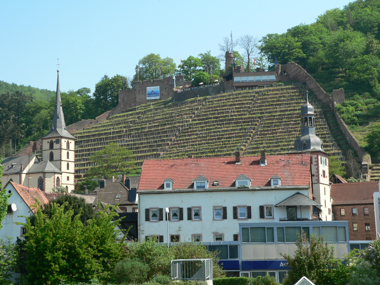 Die Clingenburg oberhalb von Klingenberg am Main, Germany - Weinberg unterhalb der Burg